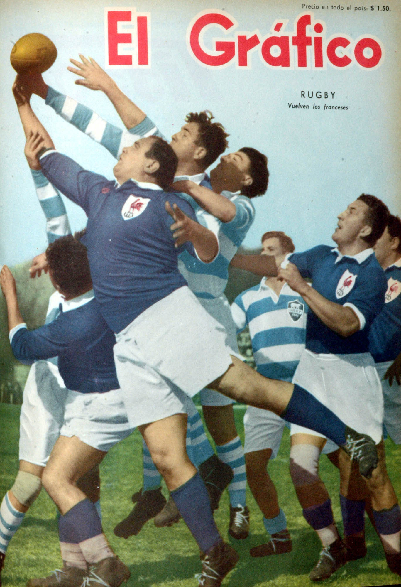 El Grafico del 06 de Agosto de 1954. Edicion 1826